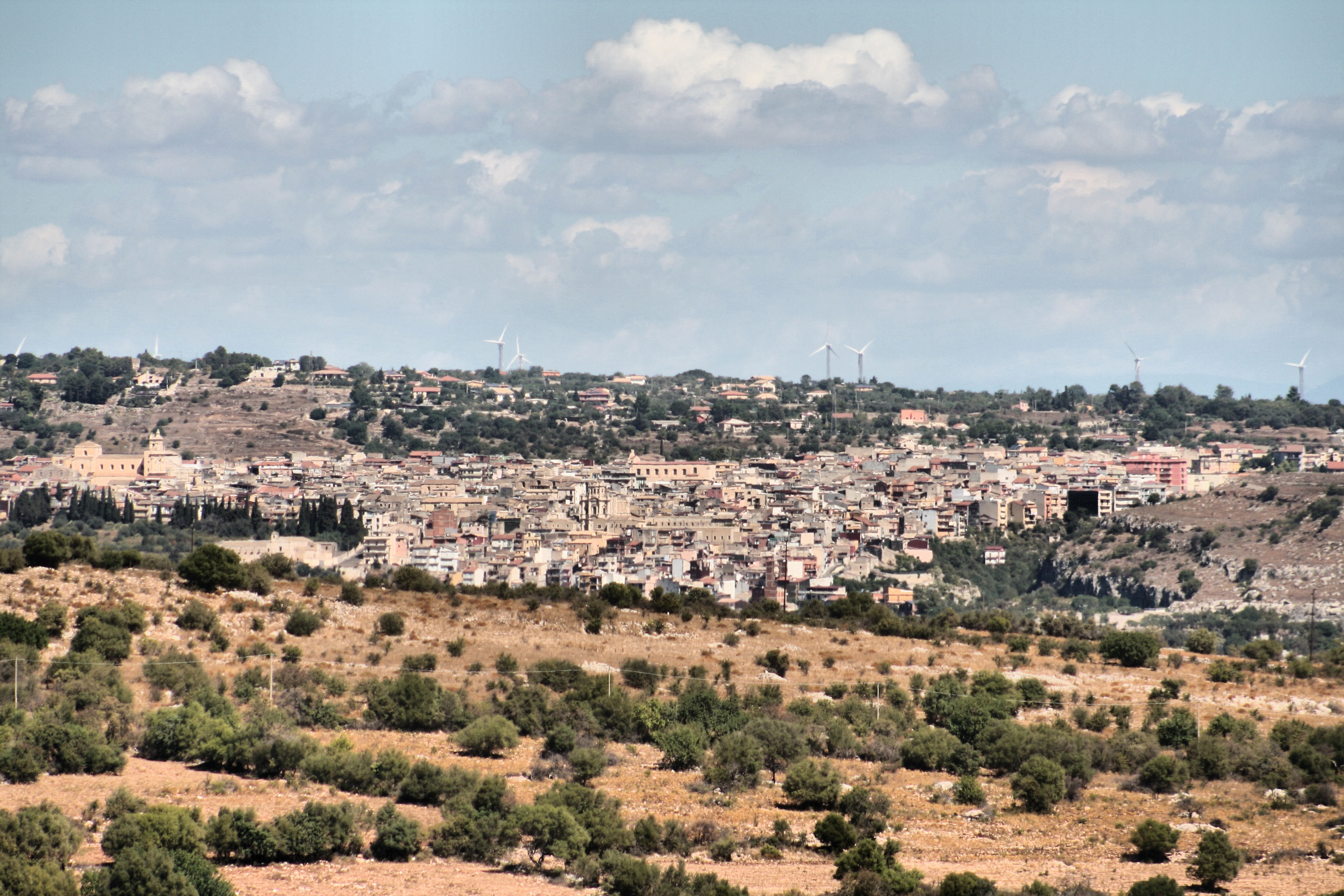 Sortino after 96kms biking uphill